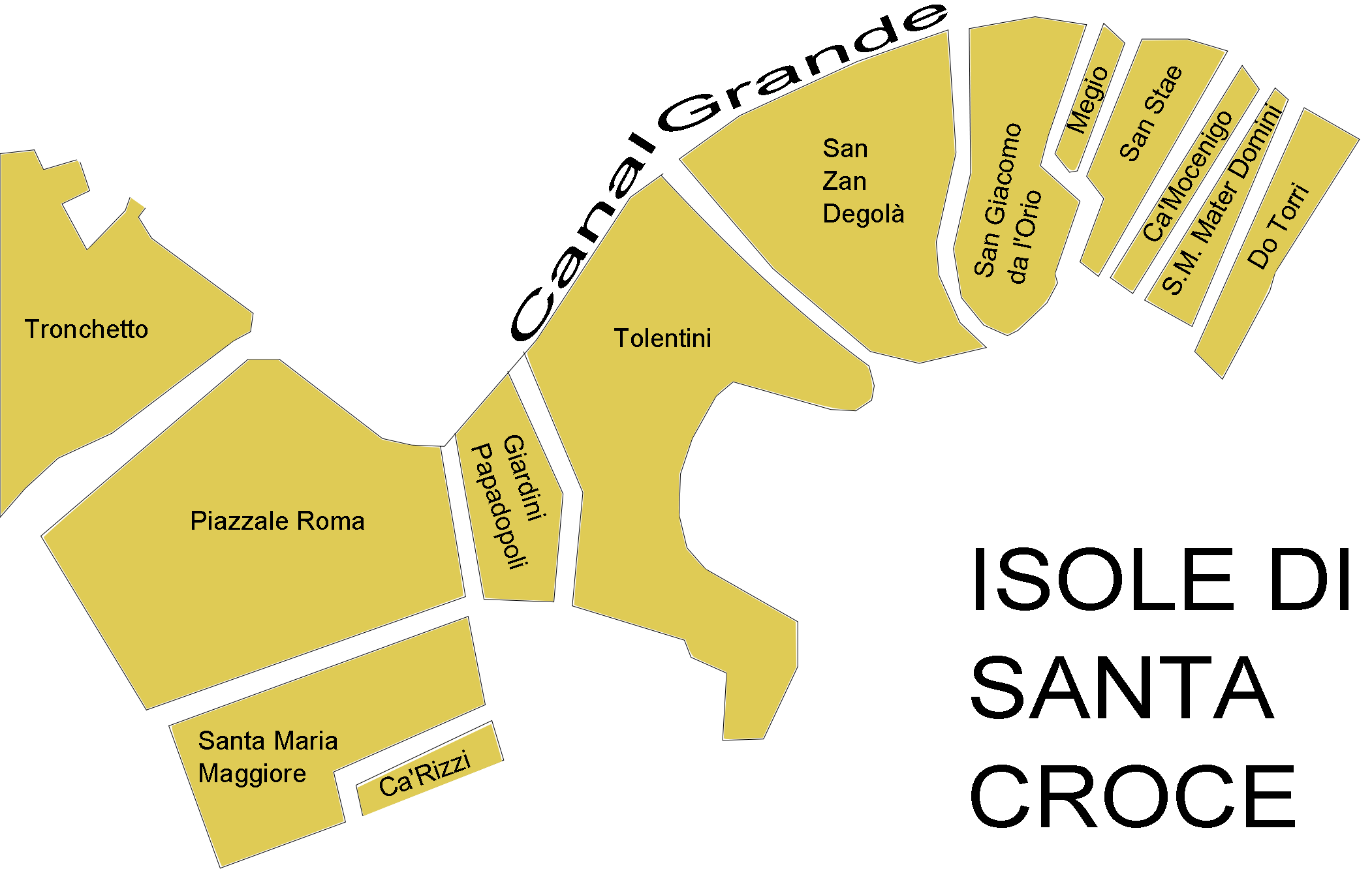 iles de santa croce venise